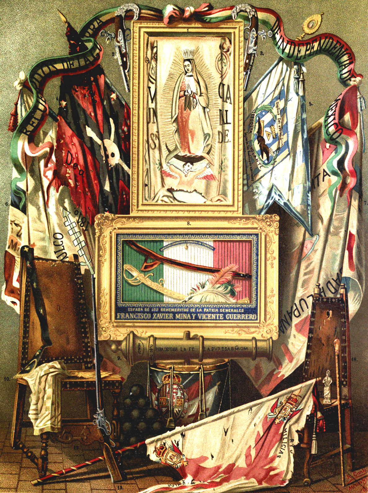 Imagen extraida del libro de Vicente Riva Palacio, Julio Zárate (1880) "México a través de los siglos" Tomo III: "La guerra de independencia" (1808 - 1821)